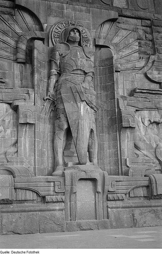 Original image description from the Deutsche Fotothek St. Michael - Detail des Völkerschlachtdenkmals